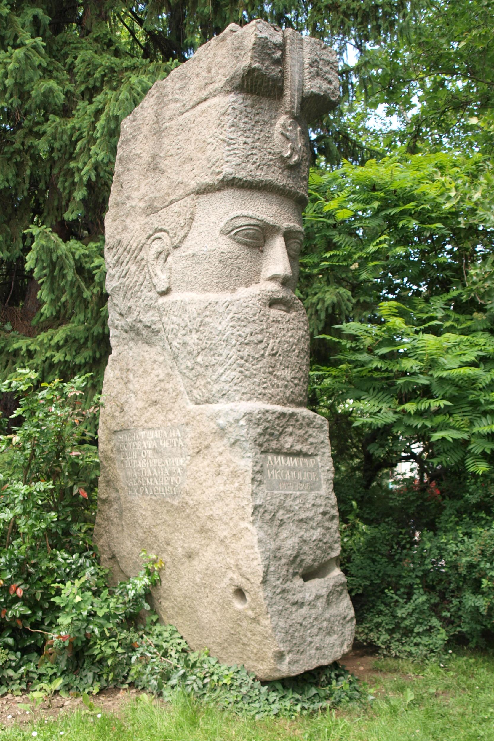 Паметник на Димитър Икономов в гр. Троян